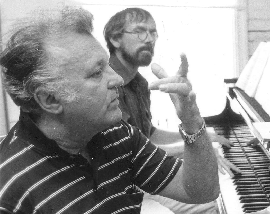 Caj Ehrstedt (oik.) keskustelee tulkinnoista Nicolai Geddan kanssa Korsholman musiikkijuhlilla 1987.